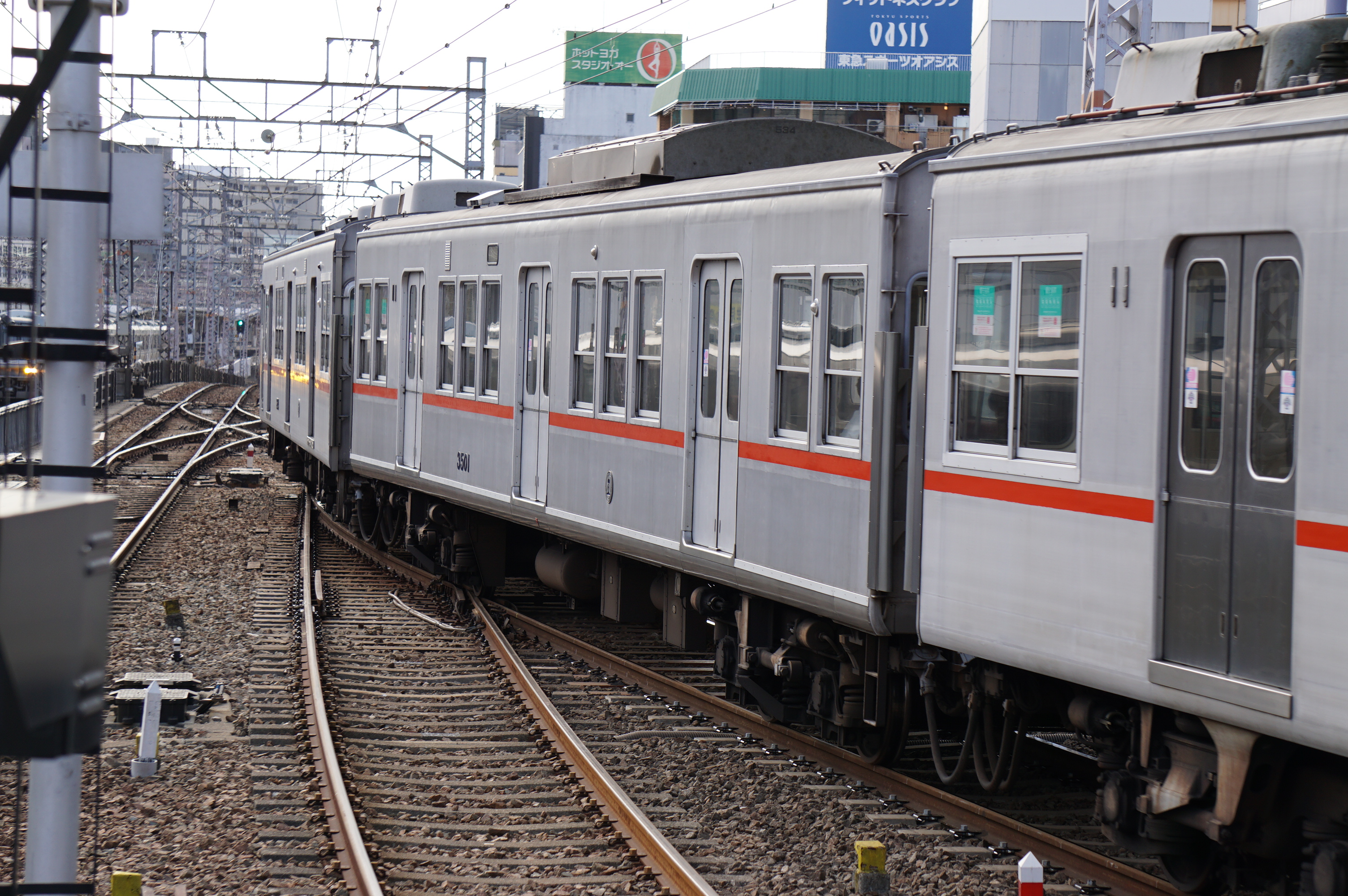 3078Fに組み込まれた3501号車。側窓の形態が異なる。 Sony ILCE-6000